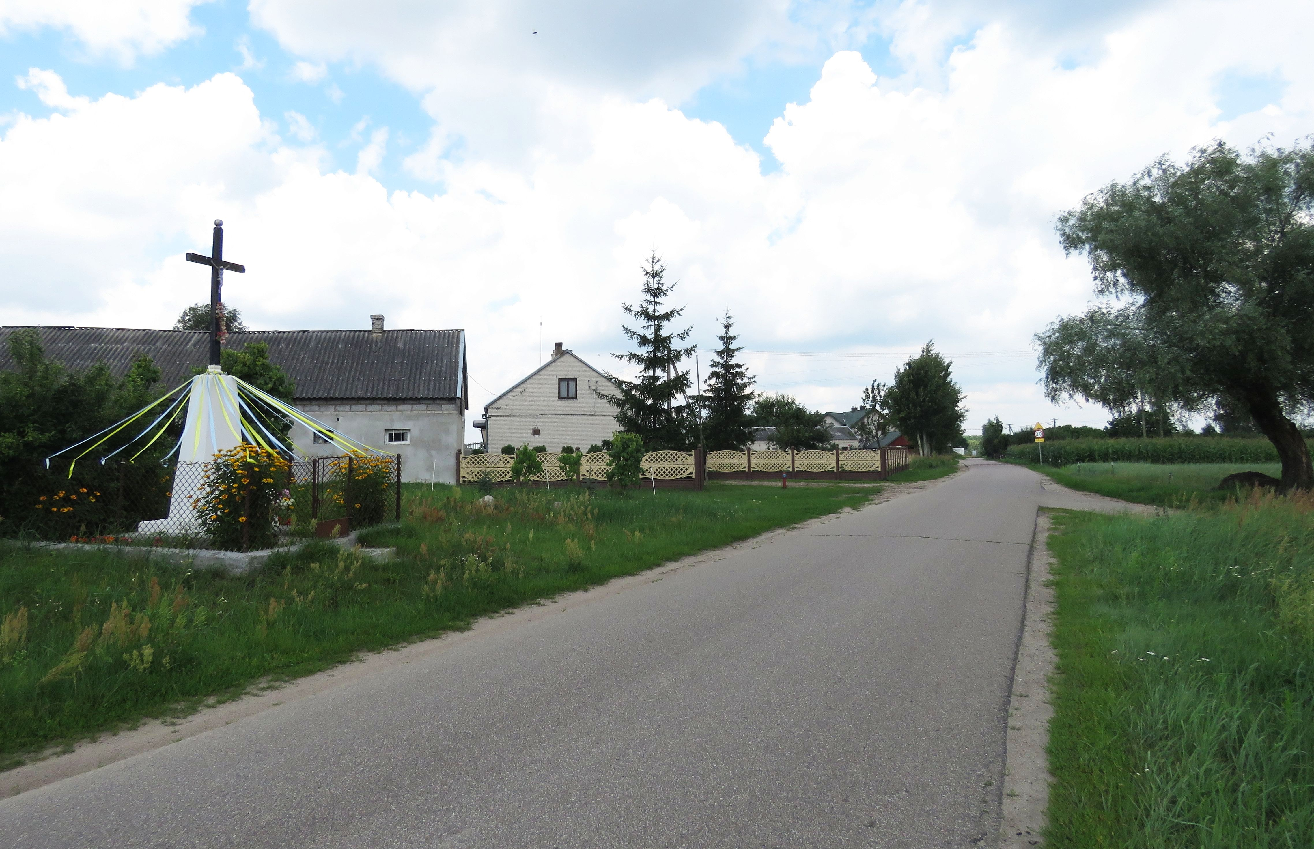 Kraszewo Czubaki